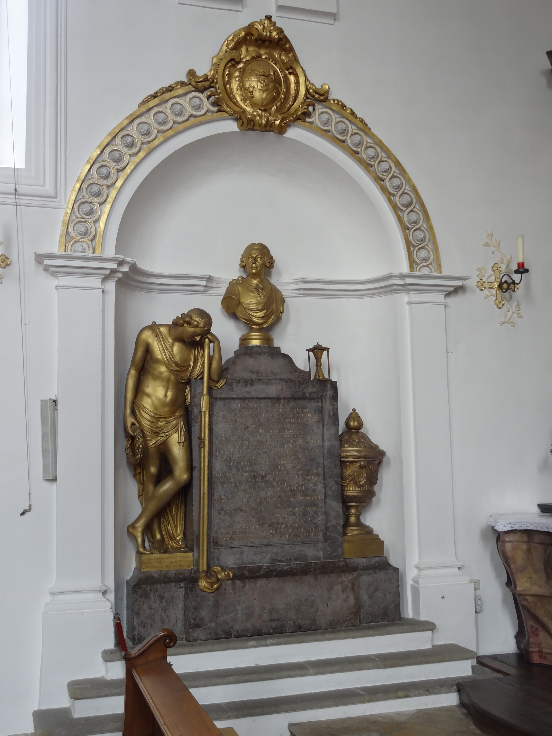 Grabmal des Wiguläus von Kreittmayr († 1790) in der Pfarrkirche St. Vitus in Offenstetten (Stadt Abensberg, Landkreis Kelheim)